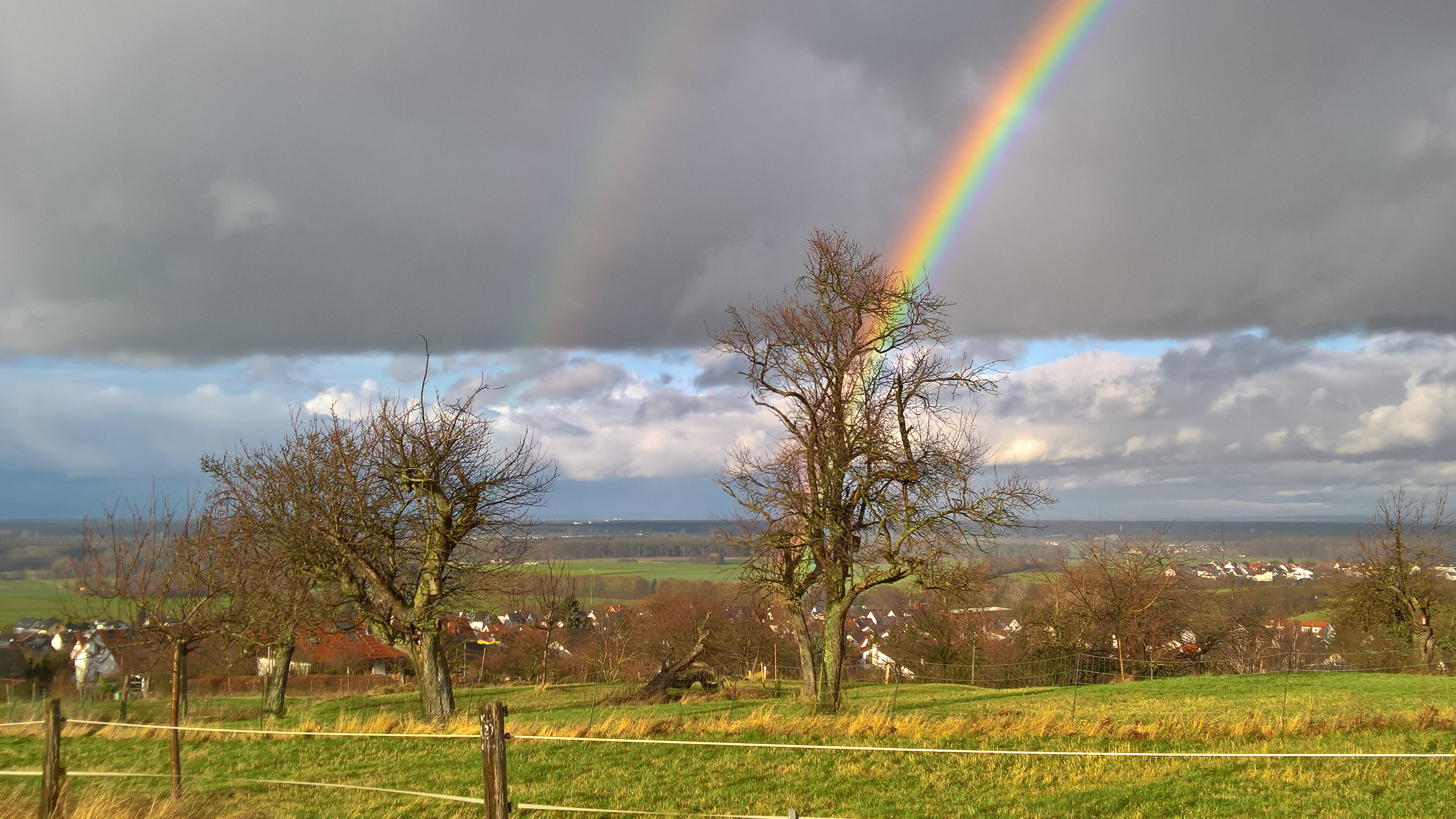 Blick von unterhalb des Wendelinushäuschens auf Klein-Umstadt und die Dieburger Bucht, am Horizont schemenhaft Frankfurt am Main und der Taunus